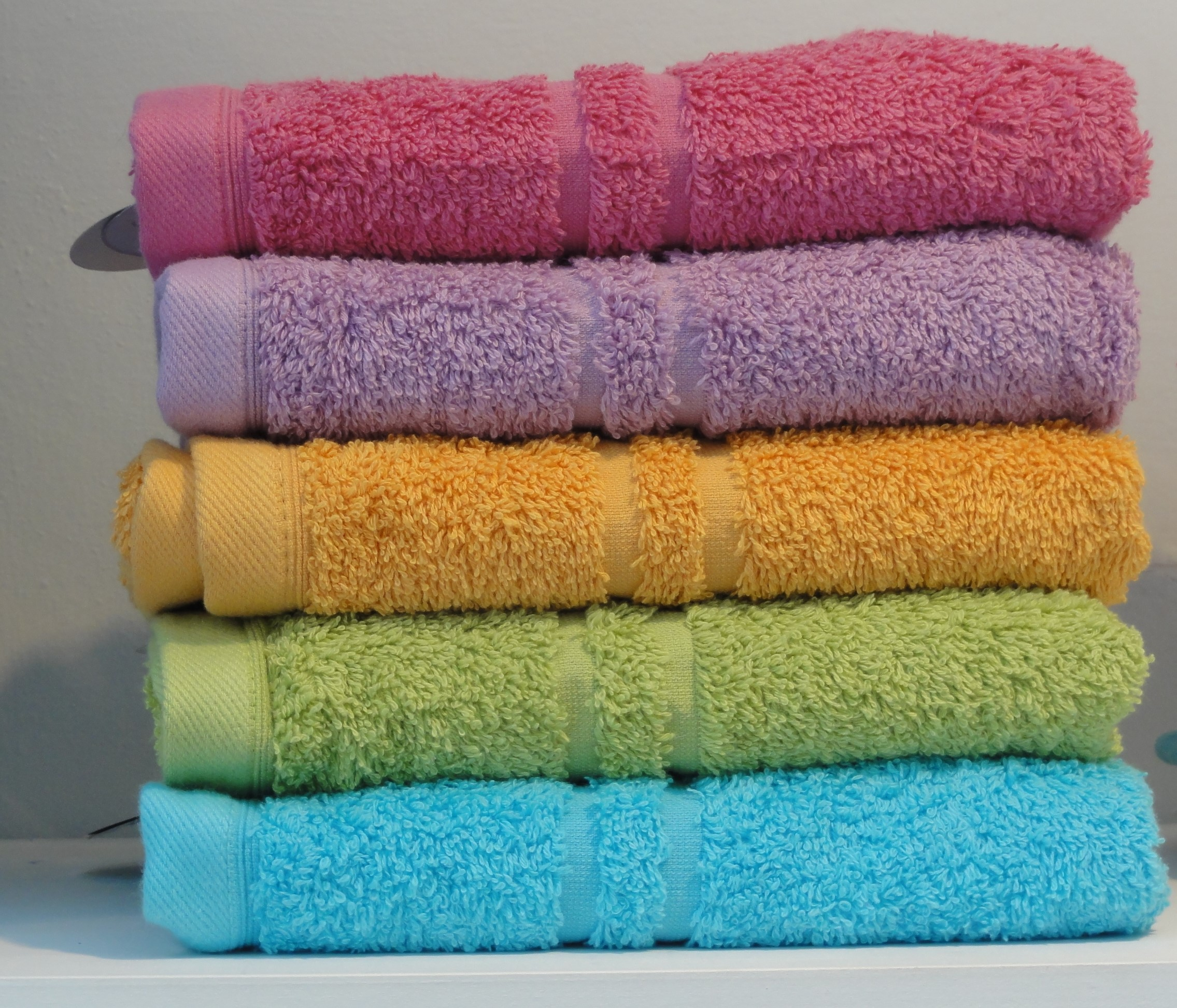 Bozen-Bolzano — Zusammengelegte Handtücher in verschiedenen Farben für die Schaufensterauslage